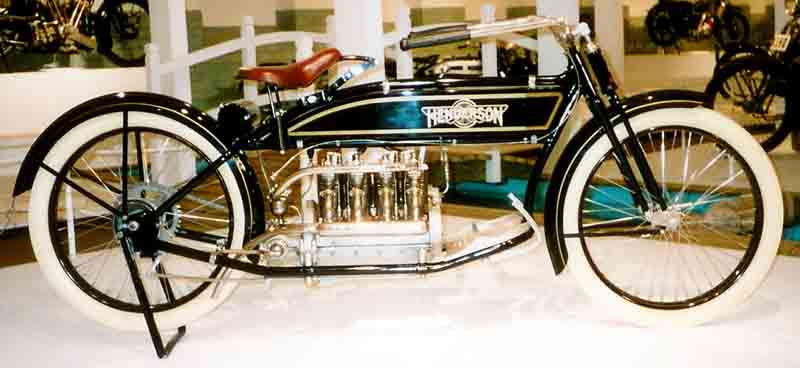 Henderson 1915